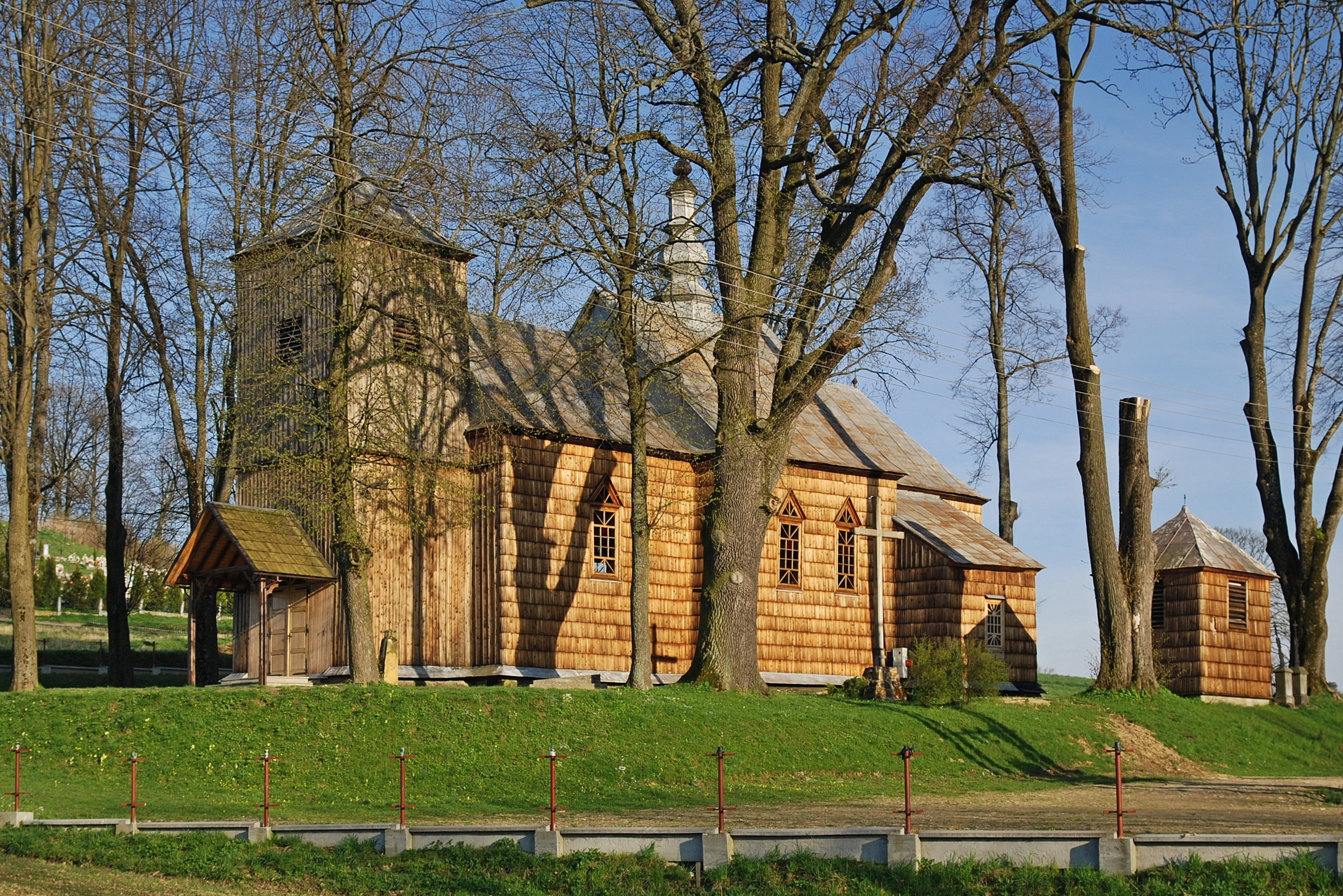 wieś Stefkowa, cerkiew św. Paraskewy Wikidata has entry Q9188049 with data related to this item.